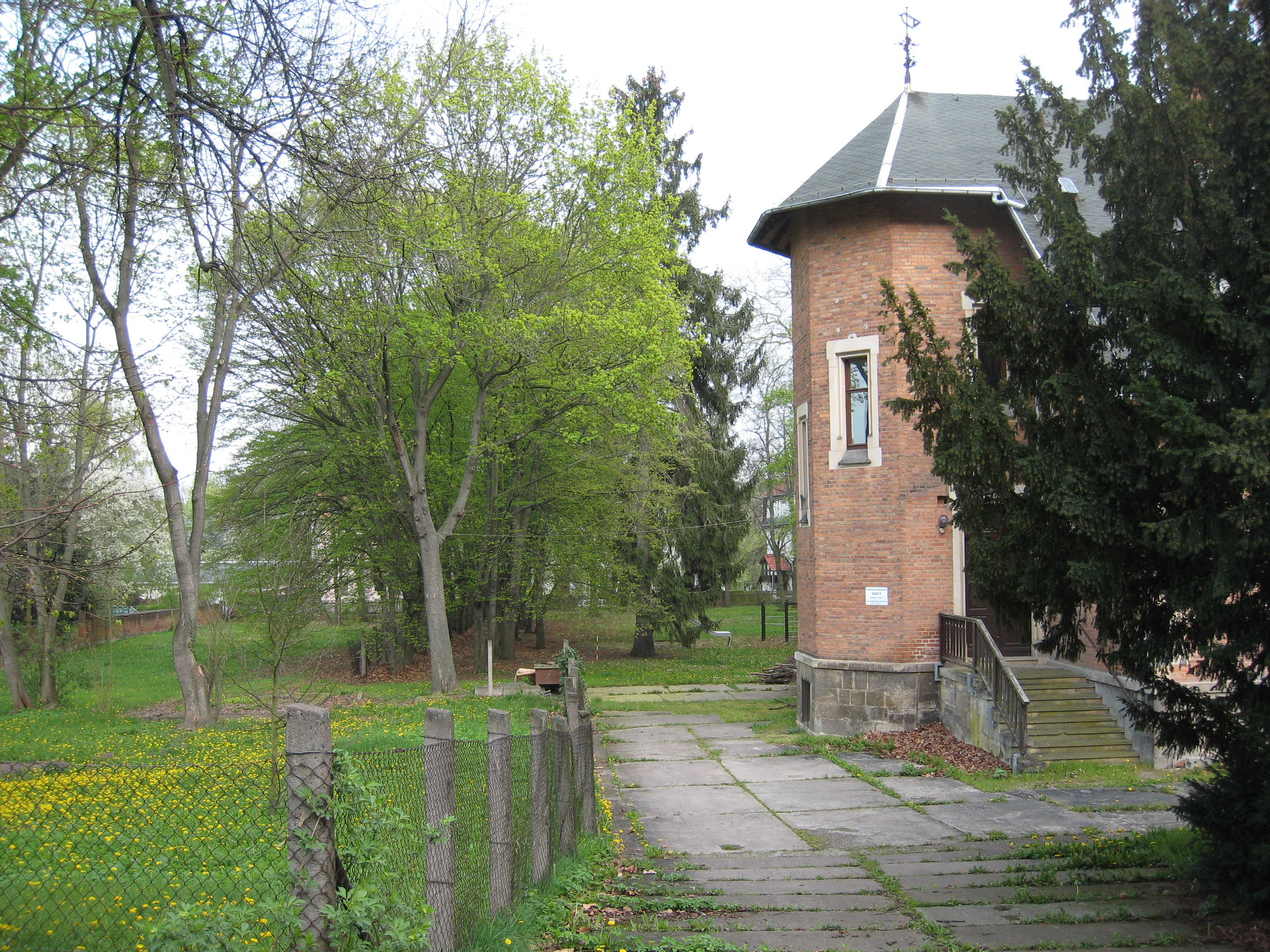 Eingang zum Villengarten Franz, Arnstadt